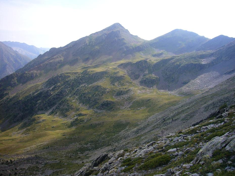 Bonys Blanc i Negra vistos des del Tuc de Comamarja; la Vall de Boí, Alta Ribagorça, Catalunya